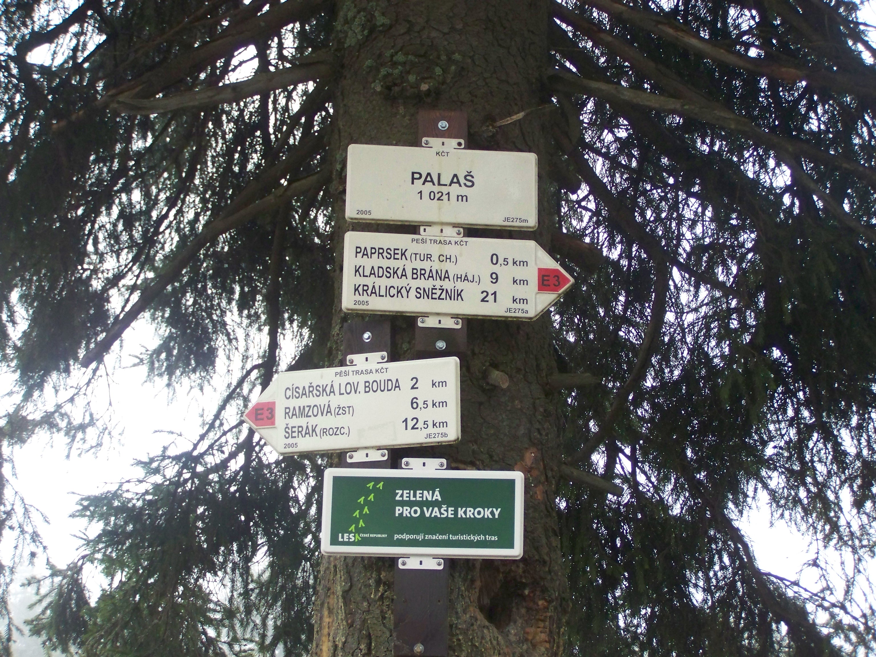 szlaki turystyczne na szczycie Palas